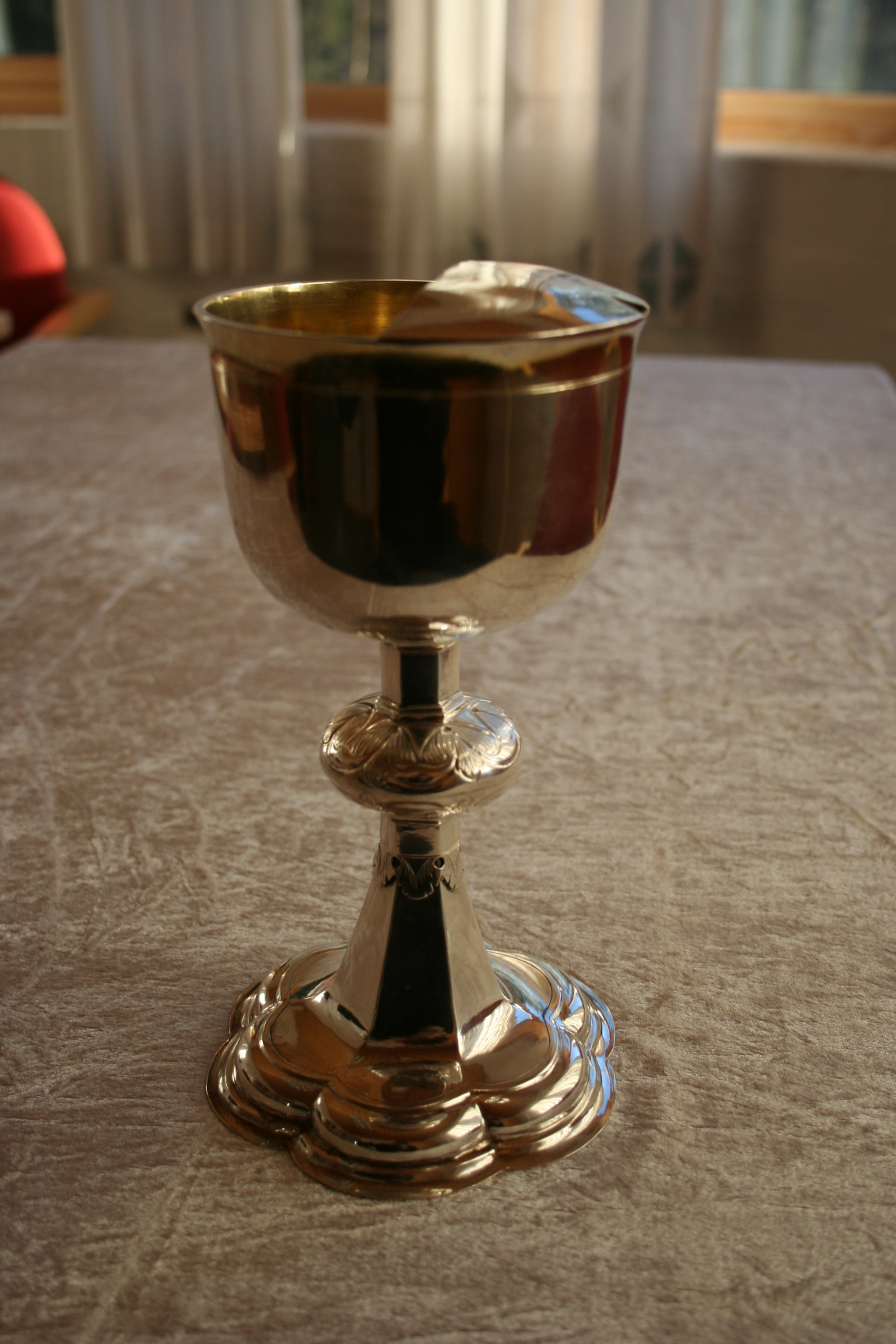 Sølvkalk, Konnerud gamle kirke, Drammen